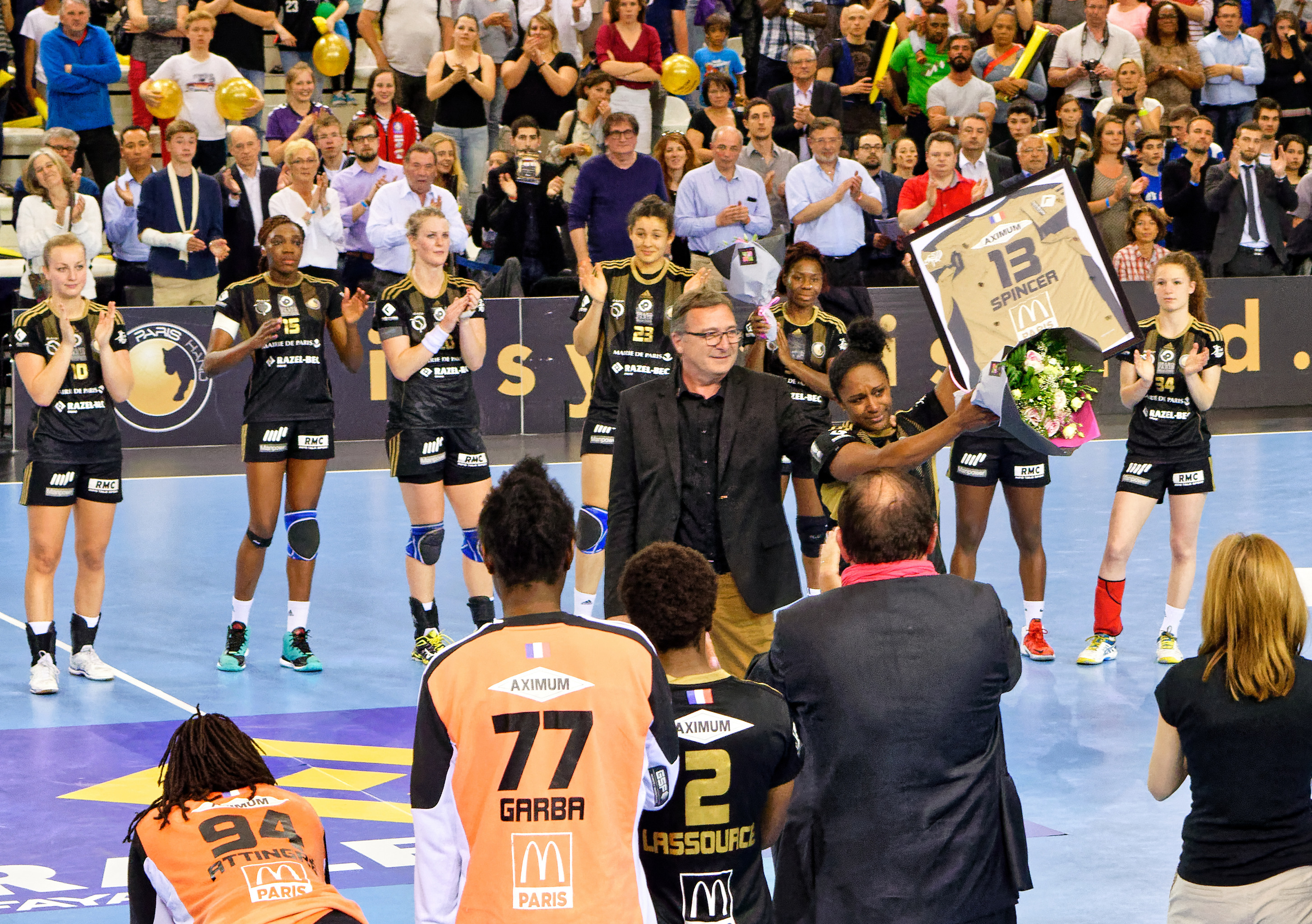 Les adieux d'Angélique Spincer qui quitte le club d'Issy Paris Hand après 9 ans. Le 27 mai 2015 à Issy Les Moulineaux.